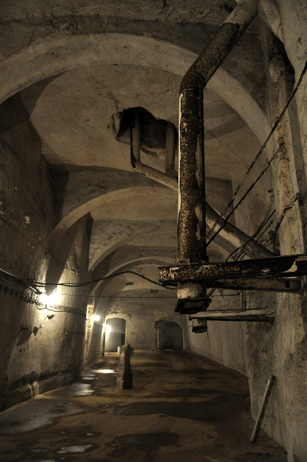 Kőbánya limestone mine